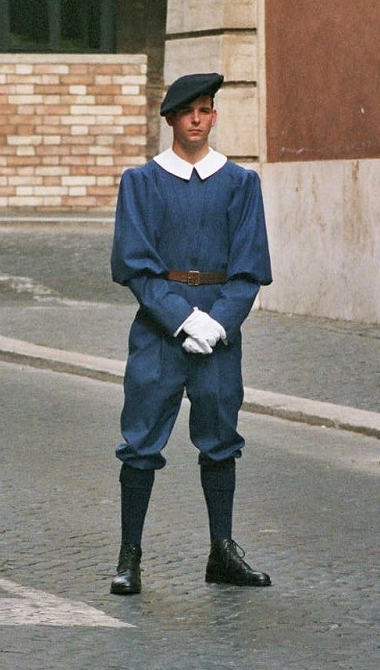 Guardie Svizzere / Swiss Guards